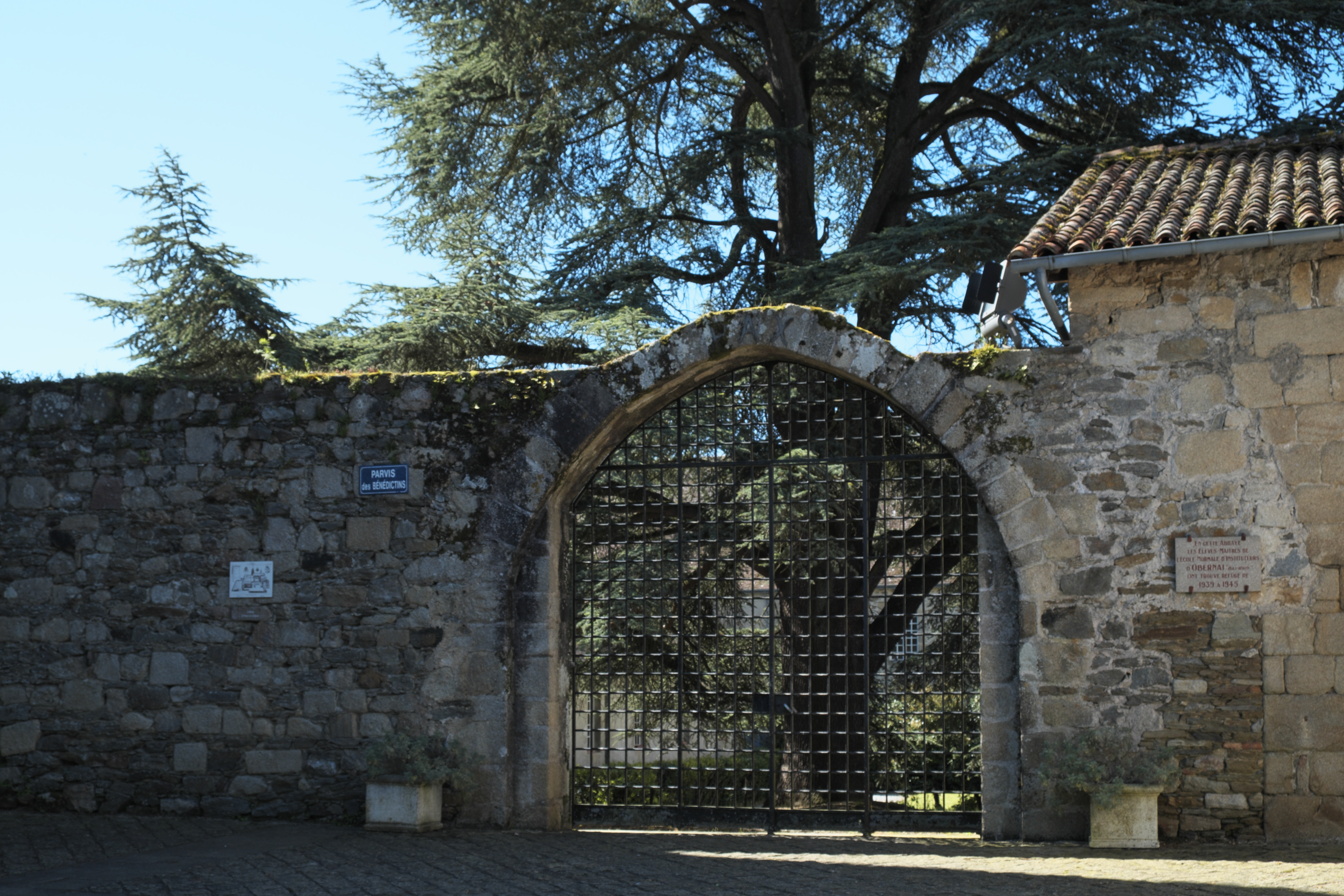 Tor zur ehemaligen Abtei in Solignac im Département Haute-Vienne (Nouvelle-Aquitaine/Frankreich)